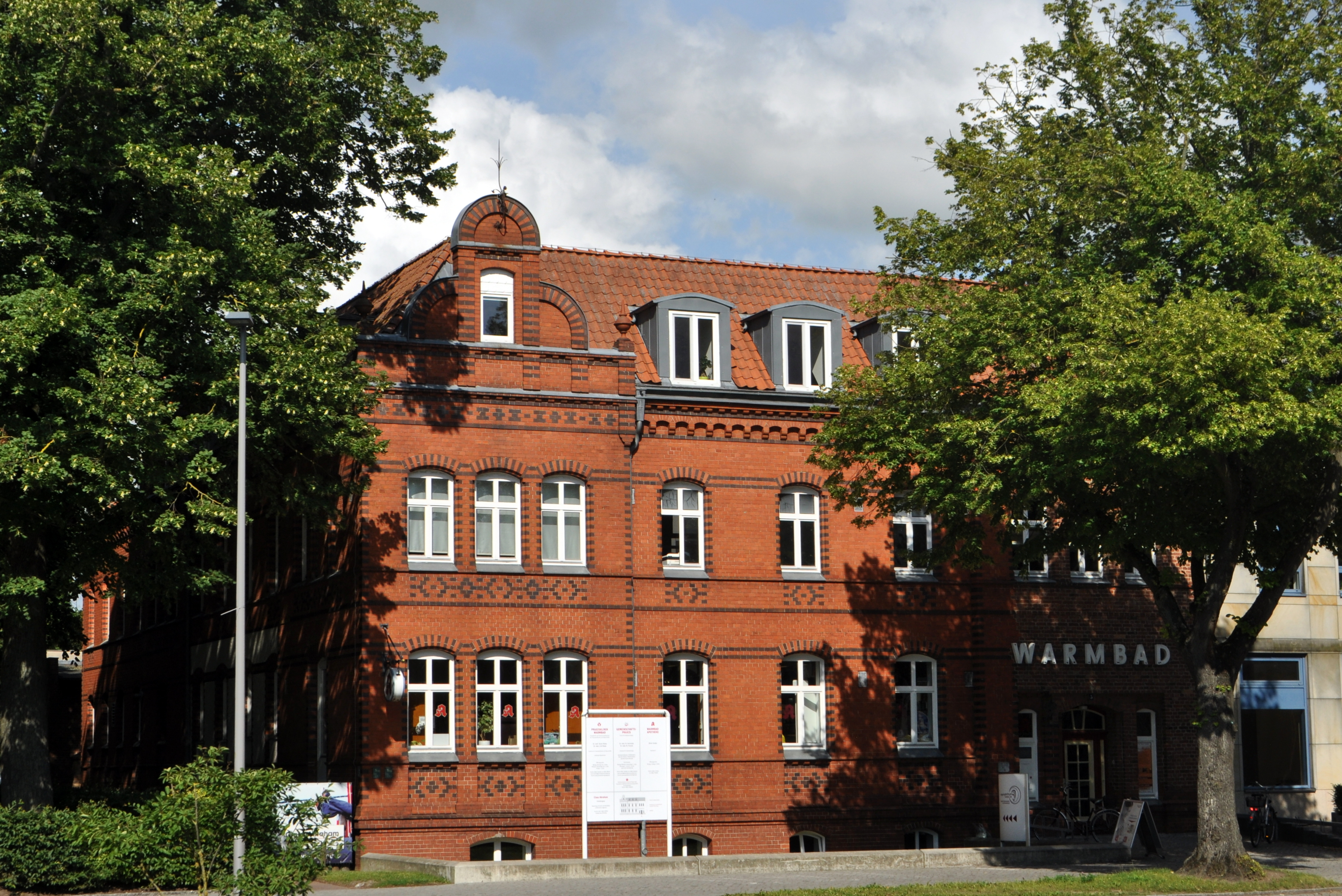 Stralsund, Olof-Palme-Platz 5, (2017-07-06) This is a photograph of an architectural monument.